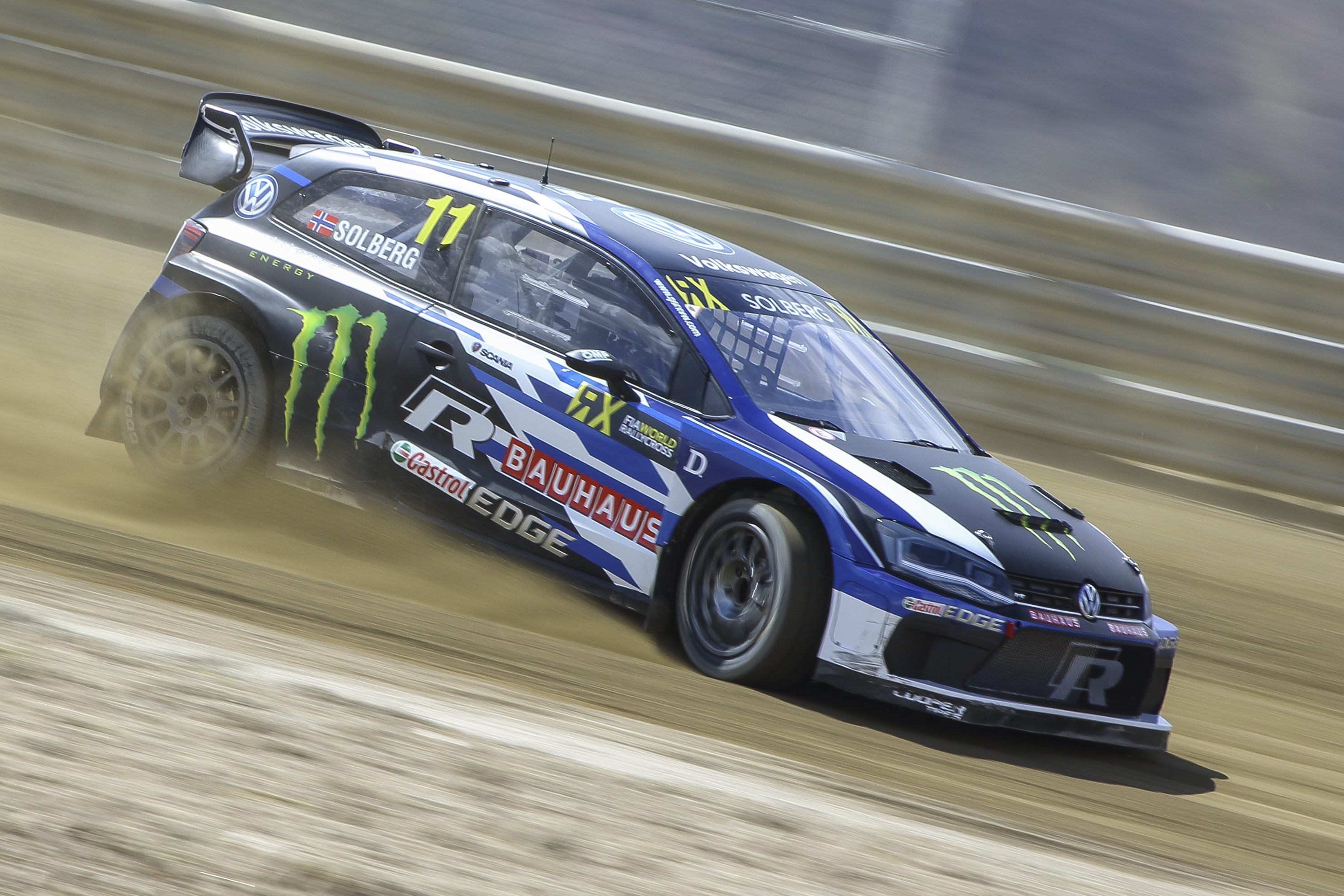 Johan Kristofferssonganó en la final en Portugal, tras hacerlo en España, el Sueco se afianza en el liderato provisional del Campeonato. Sin embargo no fue el mejor en las mangas de entrenamiento que fueron dominadas por Andreas Bakkerud.